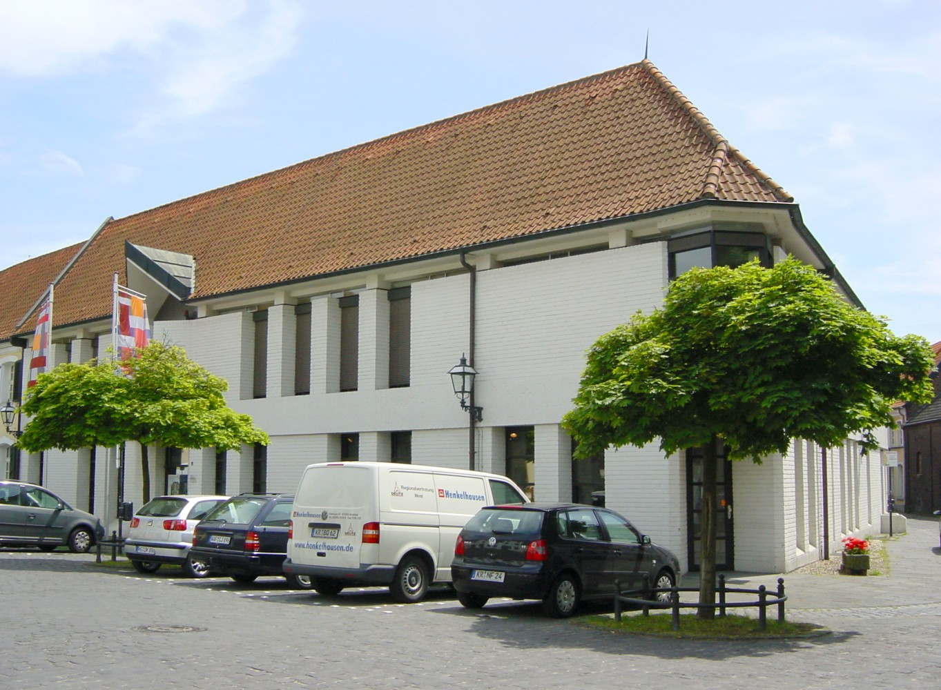 Bildbeschreibung: Deutsches Textilmuseum, Krefeld-Linn Quelle: selbst fotografiert Datum: 18.06.2006 Fotograf/Zeichner: DER UNFASSBARE